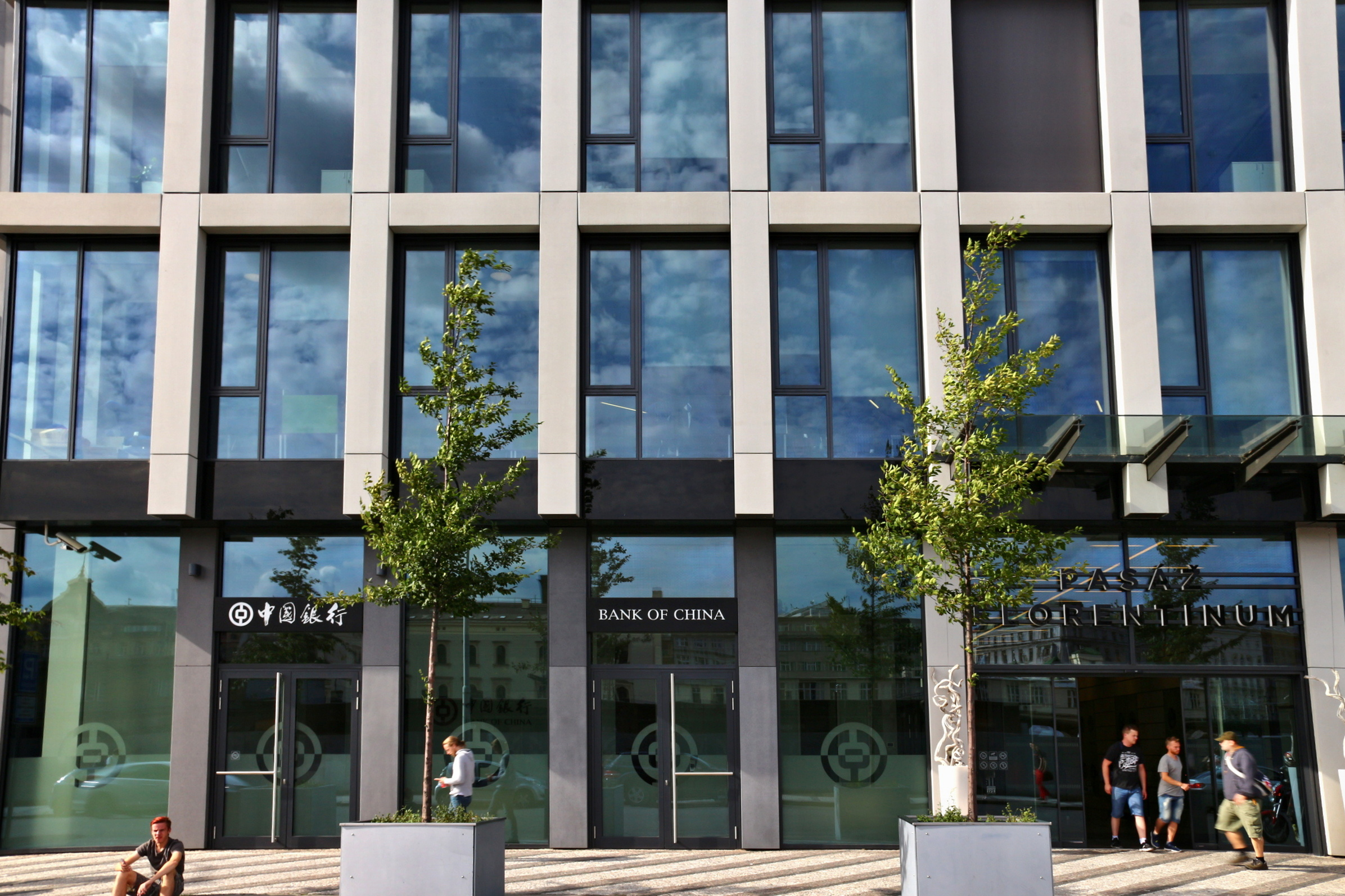 Pasáž Florentinum, pražská pobočka Bank of China